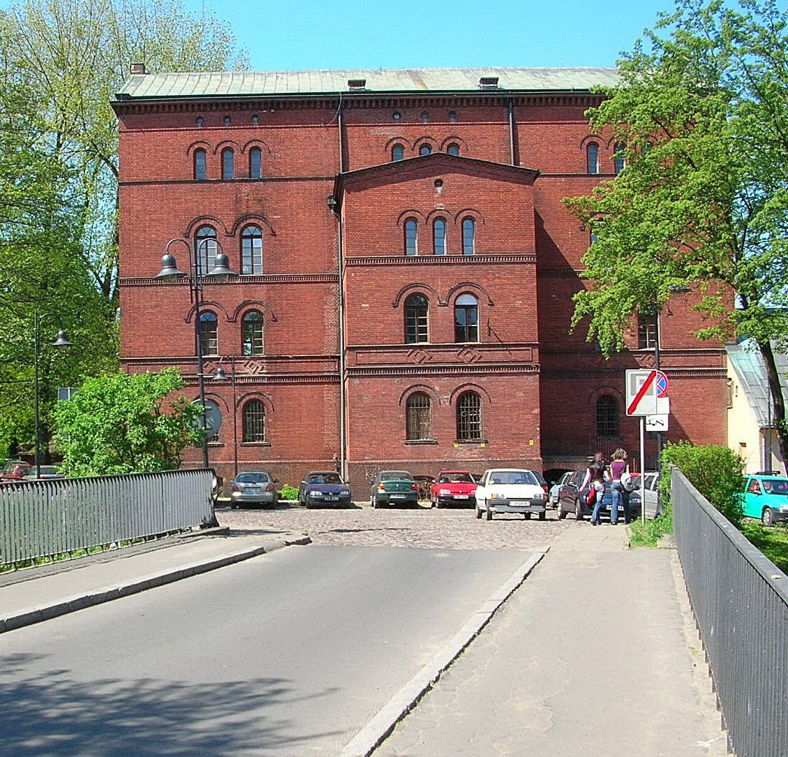 Czerwony Spichlerz na Wyspie Młyńskiej w 2005 r.